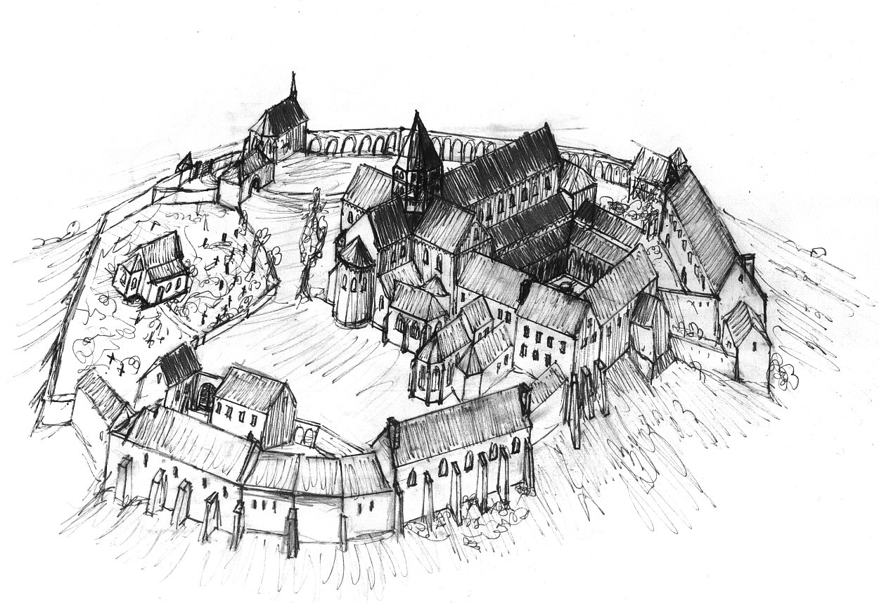 Kloster Disibodenberg, Rekonstruktionsversuch der mittelalterlichen Klosteranlage um 1500